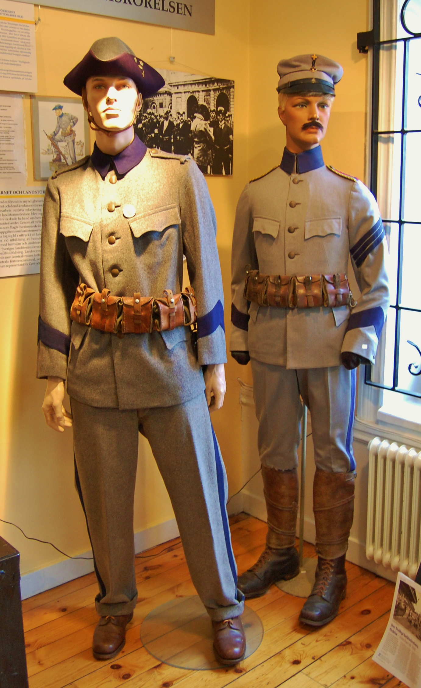 Landstormsuniformer uppvisade på Hemvärnsmuseet